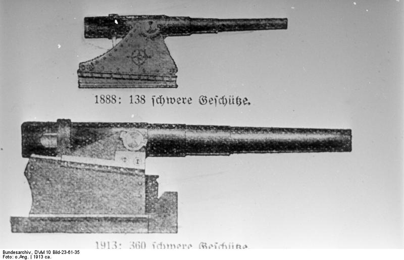 Vergleich Geschützanzahl 1888/1913 1888: 138 schwere Geschütze 1913: 360 schwere Geschütze [Vergleich der Anzahl von Geschützen 1888 / 1913]